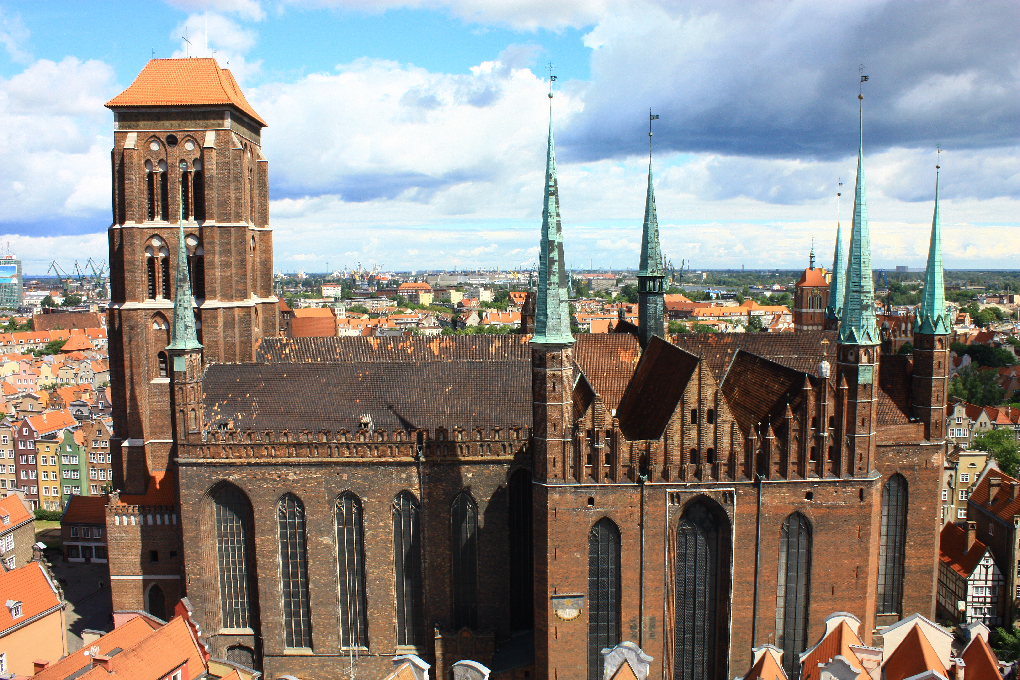 Gdańsk, kościół par. p.w. Wniebowzięcia NMP, tzw. Mariacki, 1343, 1502, po 1945